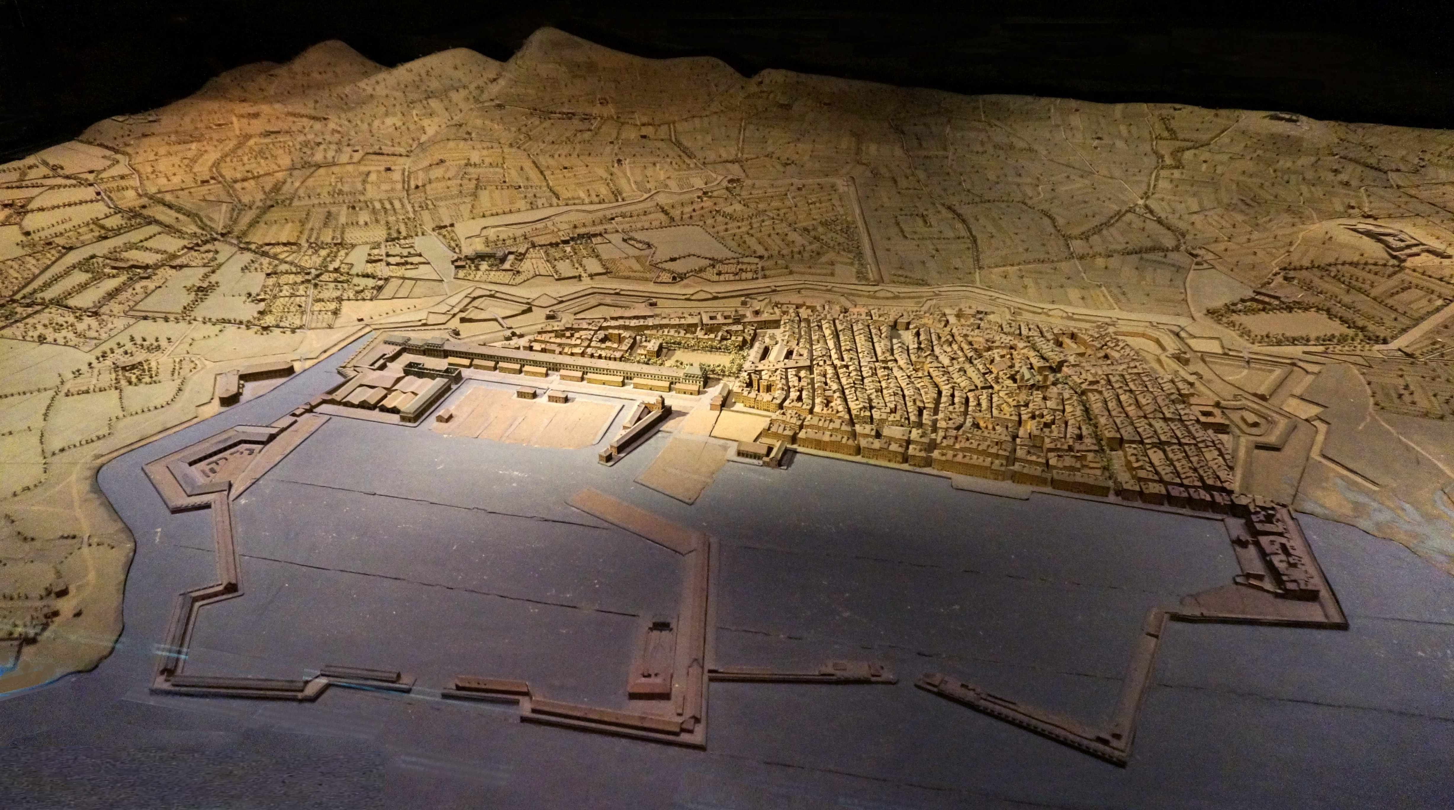 Au musée des plans et maquettes, maquette du XVII ou XVIII.